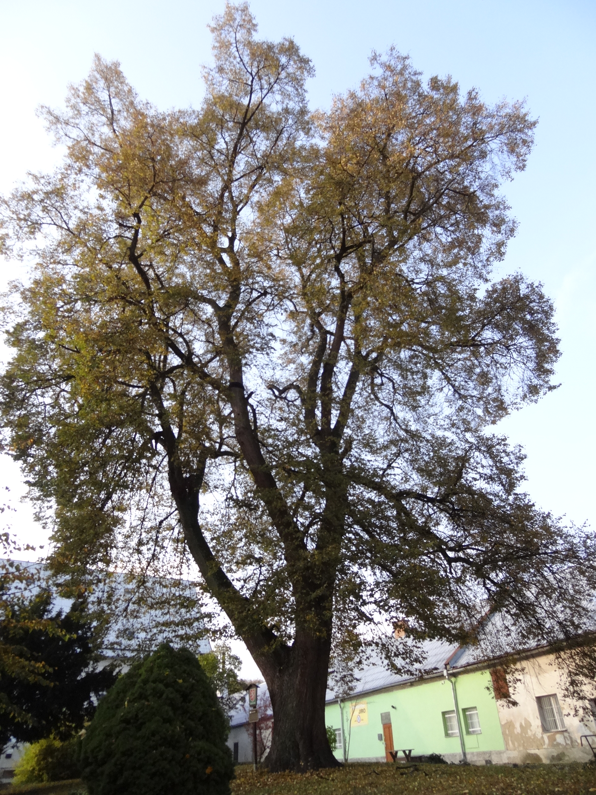 Dolní Temenice - památná lípa Johanna II. z Lichtenštejna zvaná Johanka